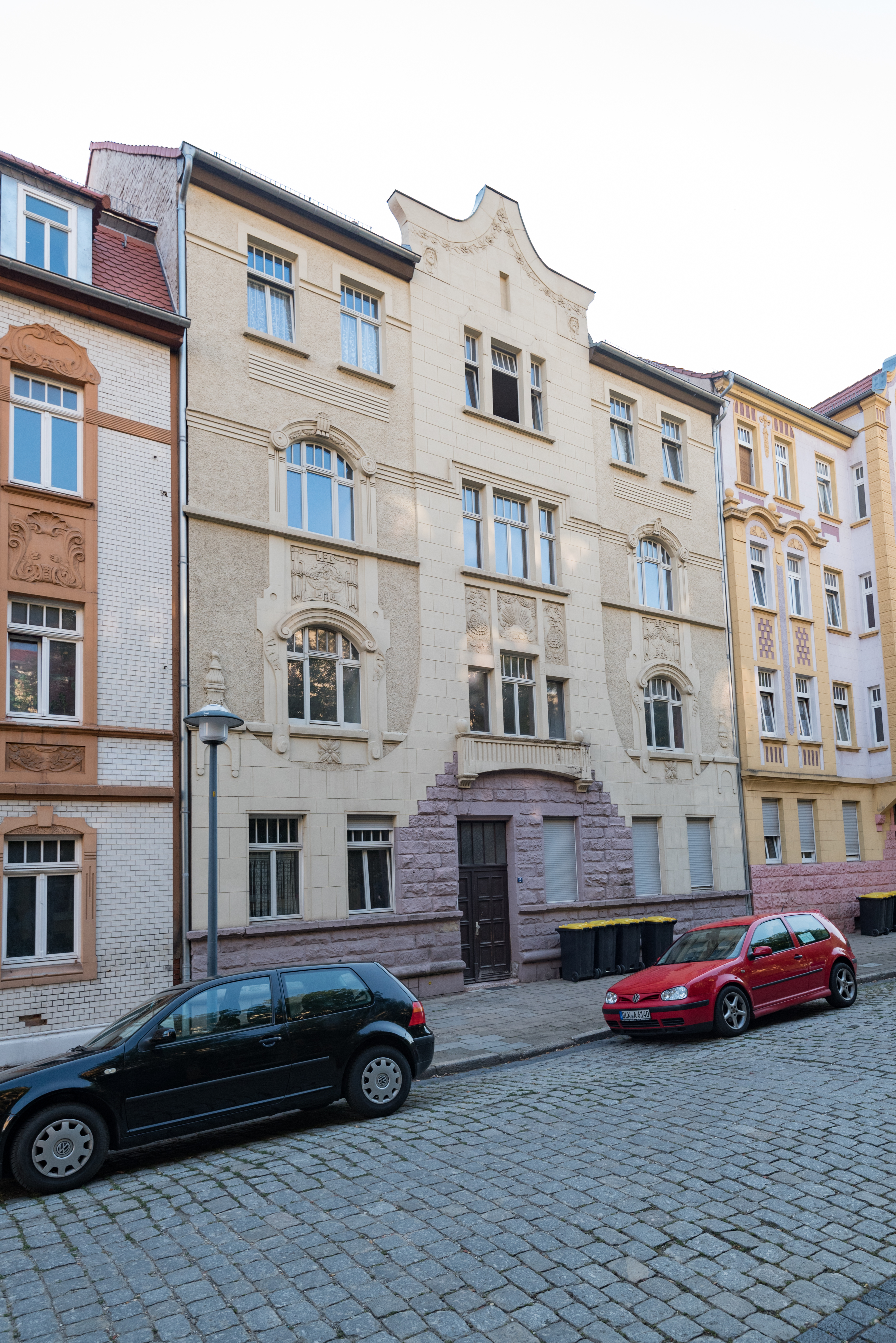 Weißenfels, Karl-Liebknecht-Straße 2